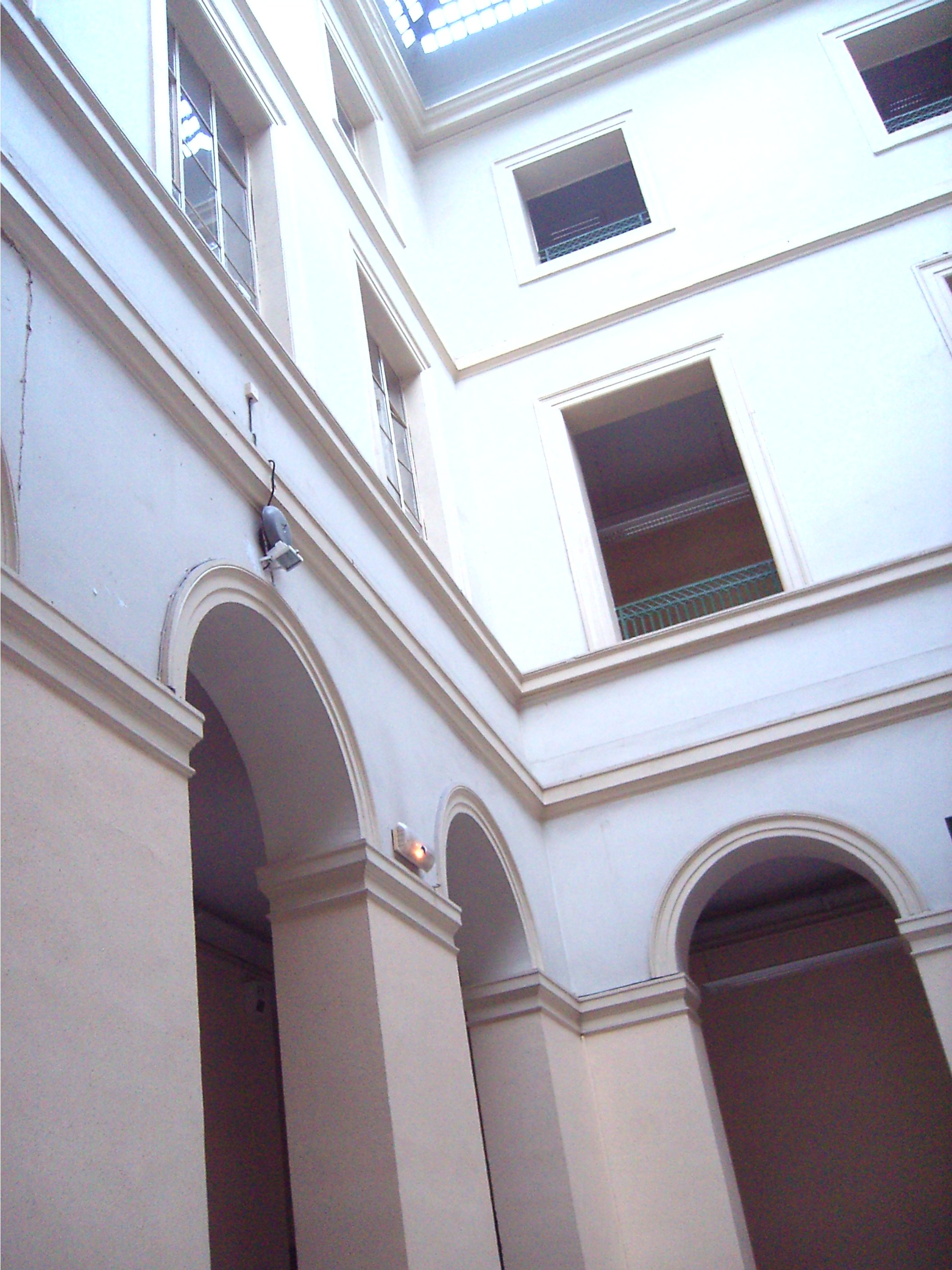 Photographie de l'intérieur du petit lycée depuis le rez-de-chaussée.